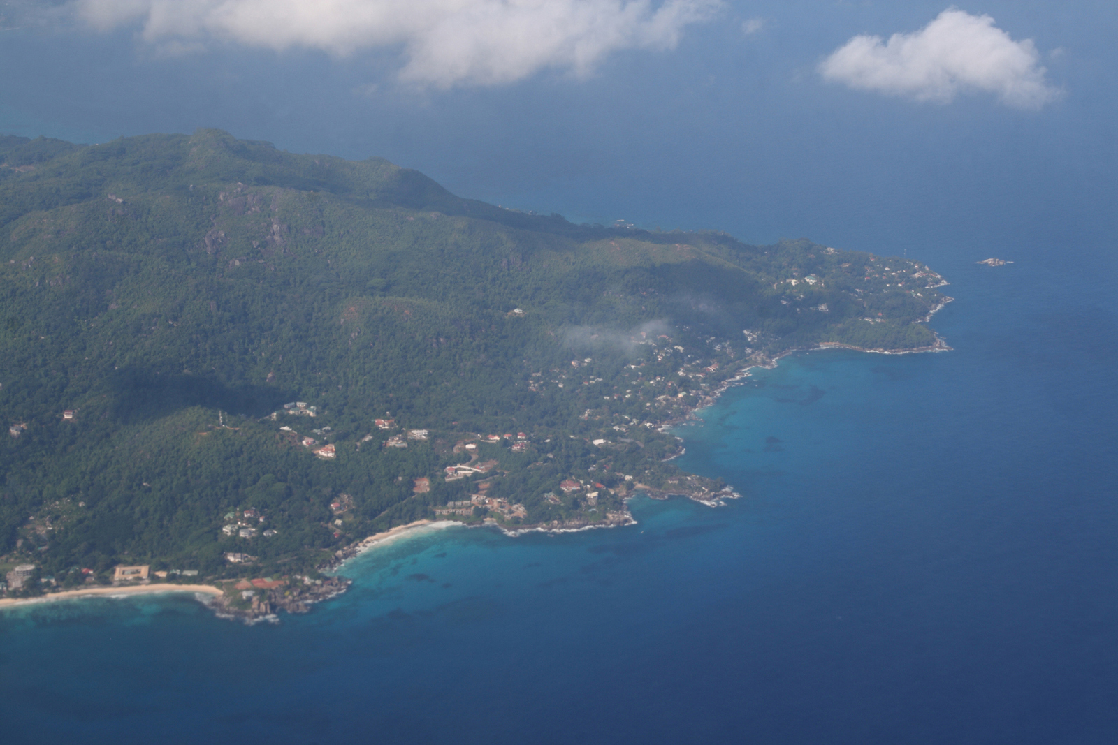 Ile de Mahe vue d'avion